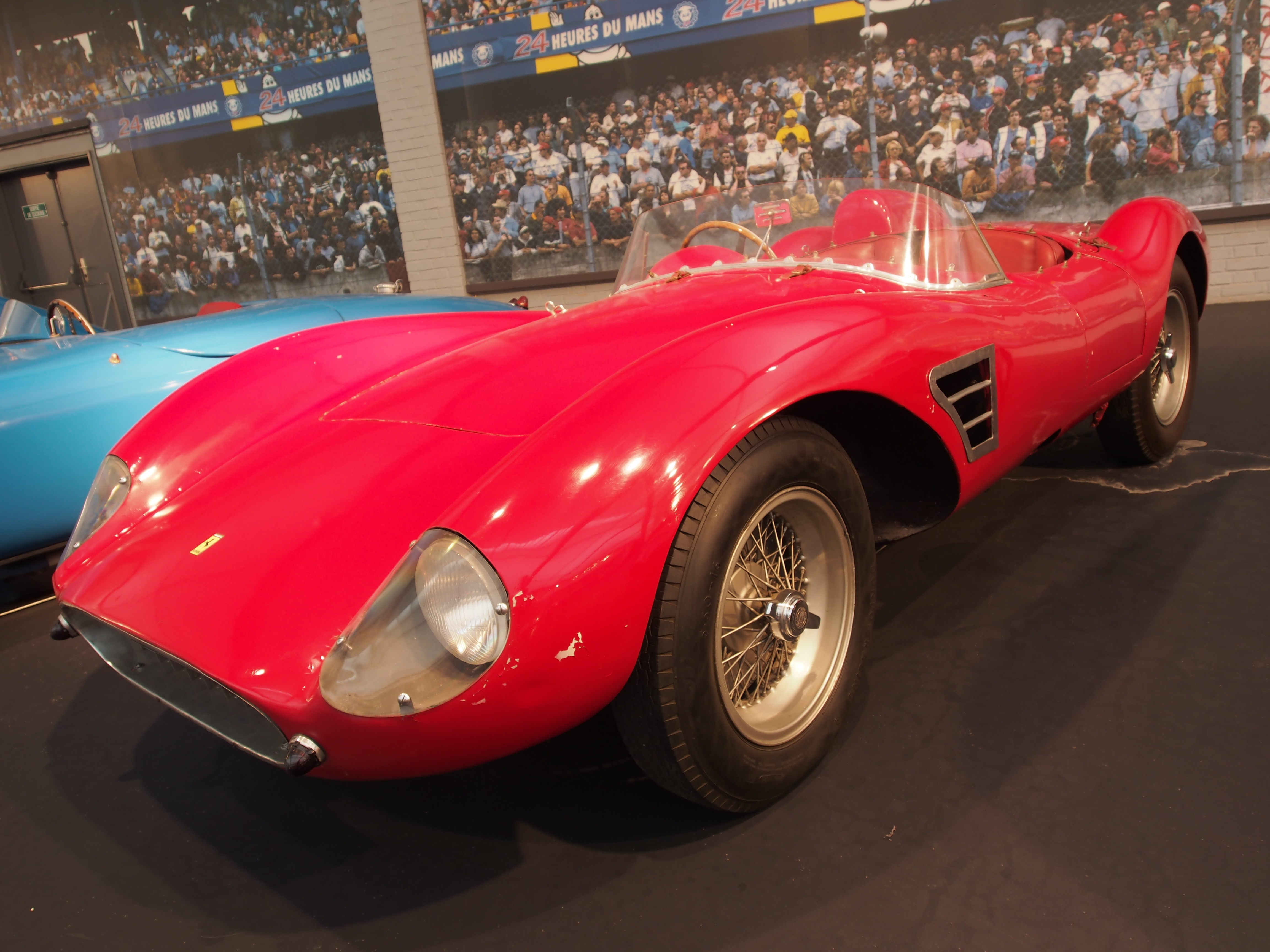 Photographed at the Cité de l’Automobile, Musée national de l’automobile, Collection Schlumpf, Mulhouse, France.